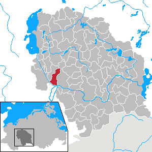 Tramm in Mecklenburg-Vorpommern - District Parchim